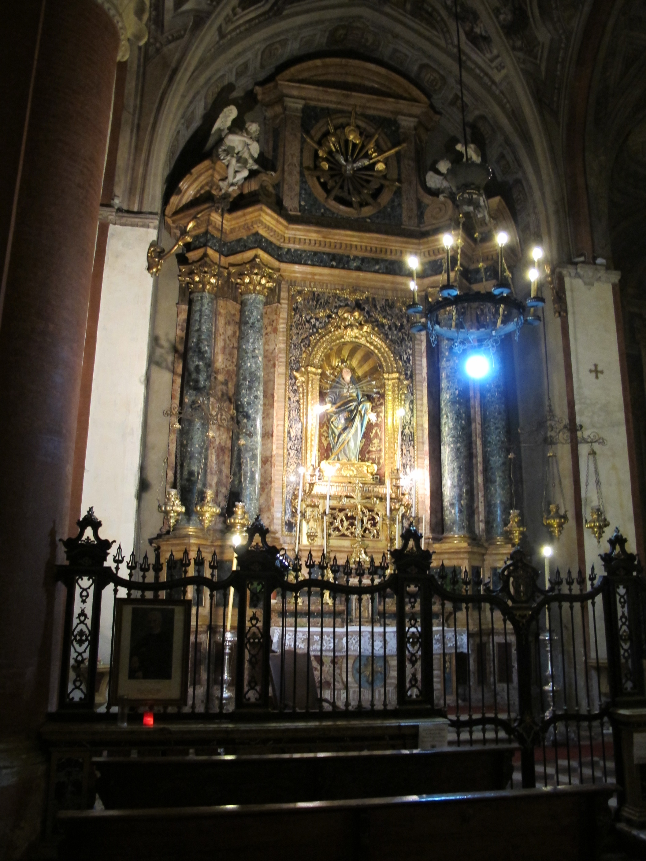 Santa Maria dei Servi, bo, interno, addolorata di angelo piò